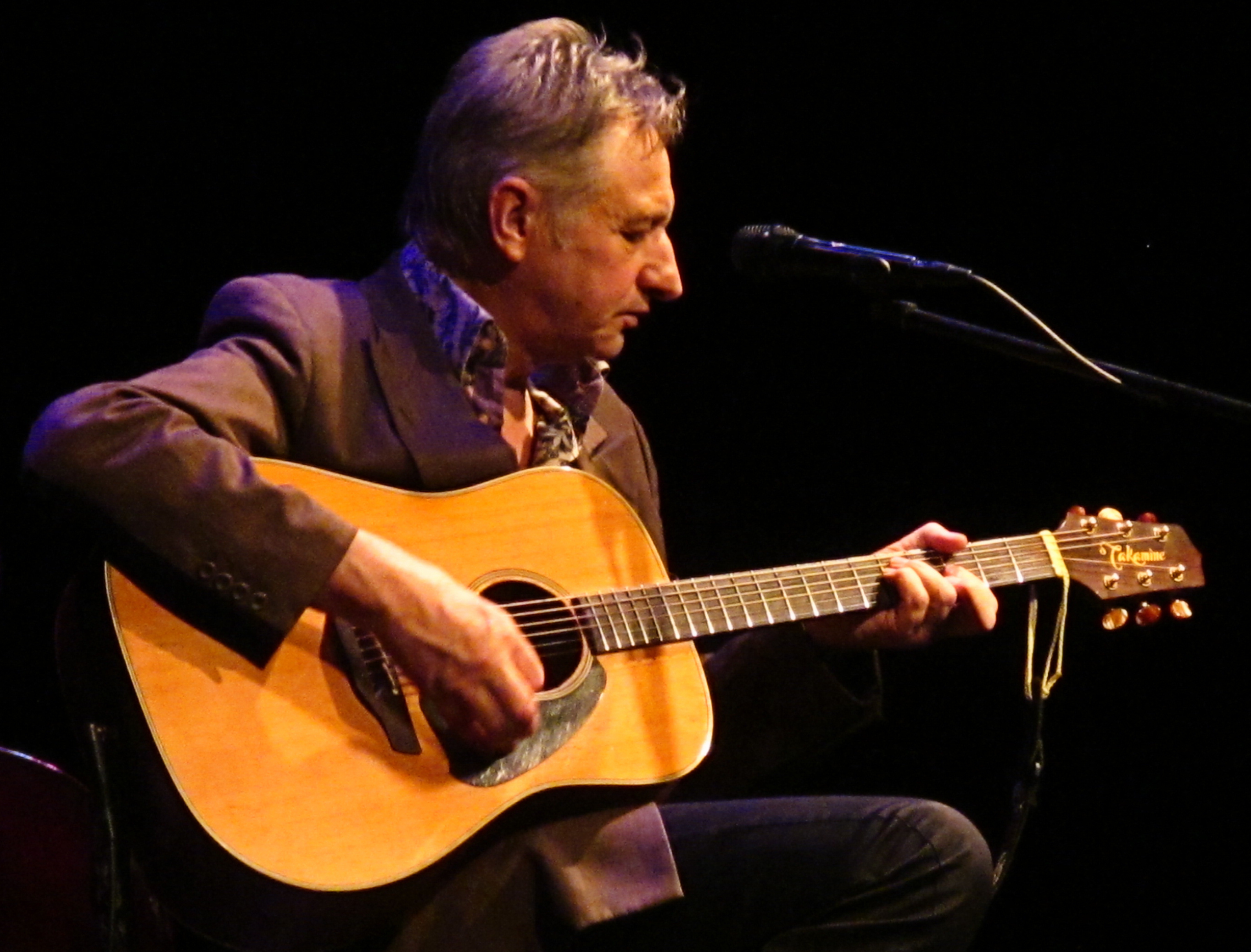 Georg Ringsgwandl am 14. Dezember 2011 in Garching